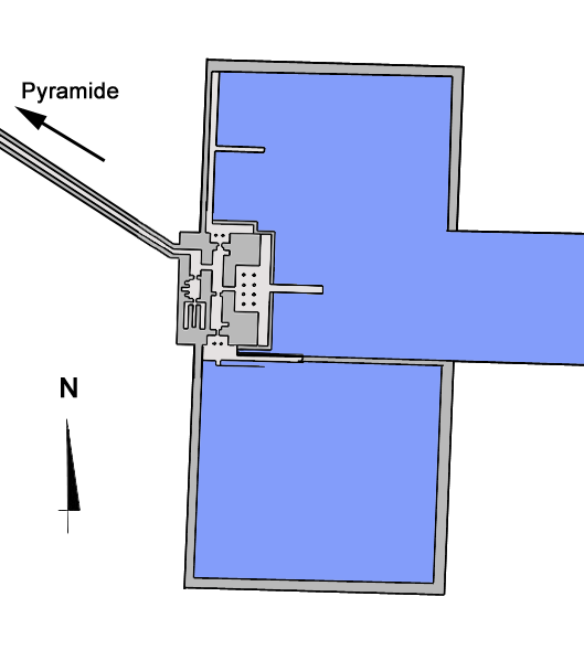 Plan of the Valley Temple of the Unas Pyramid Taltempel der Unas-Pyramide Plan du temple d'accueil et du quai du complexe funéraire d'Ounas à Saqqarah